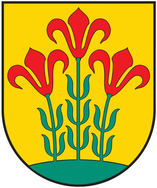 Kategorija:Lietuvos savivaldybių herbai